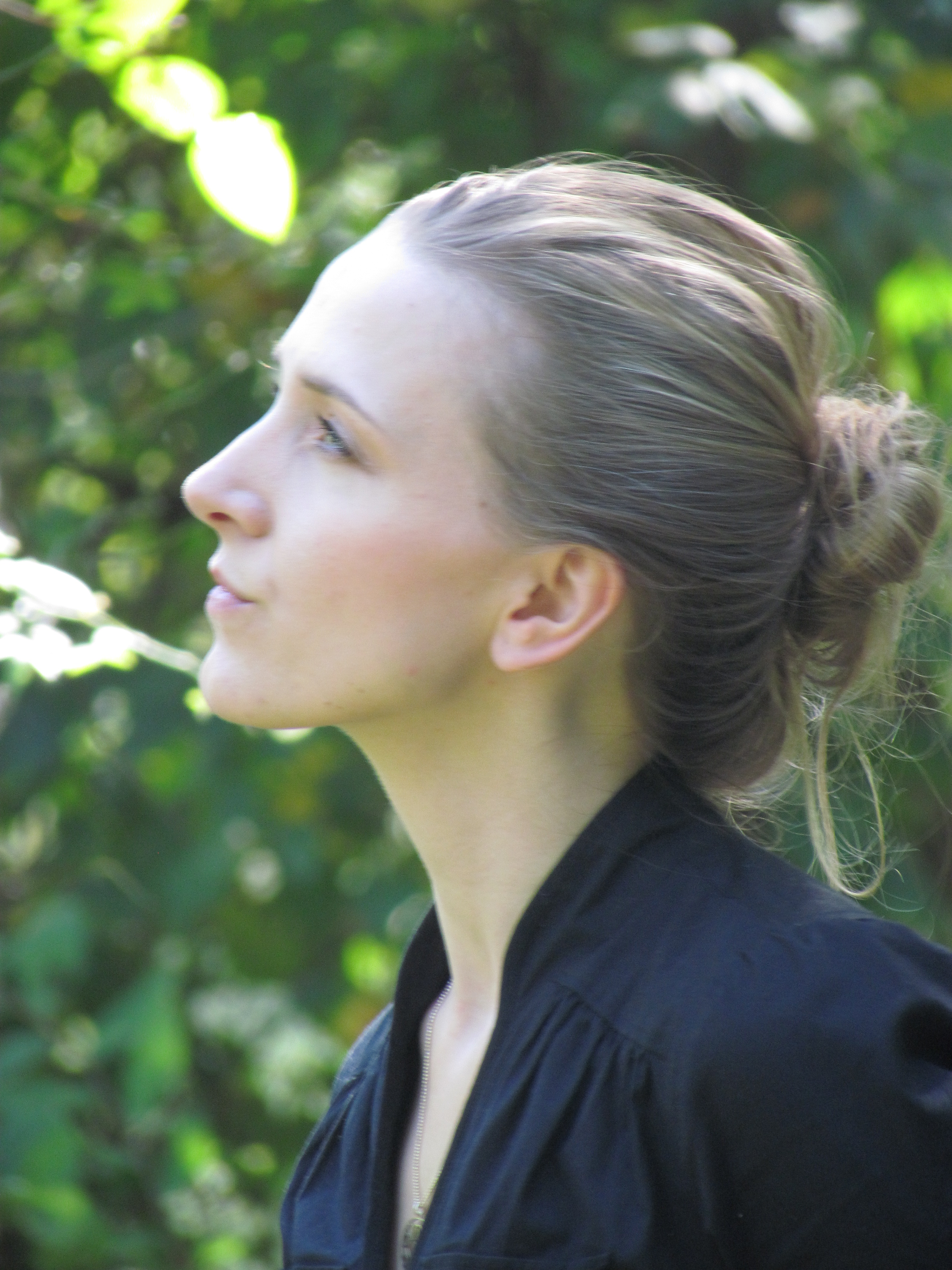 Gescinska 2013